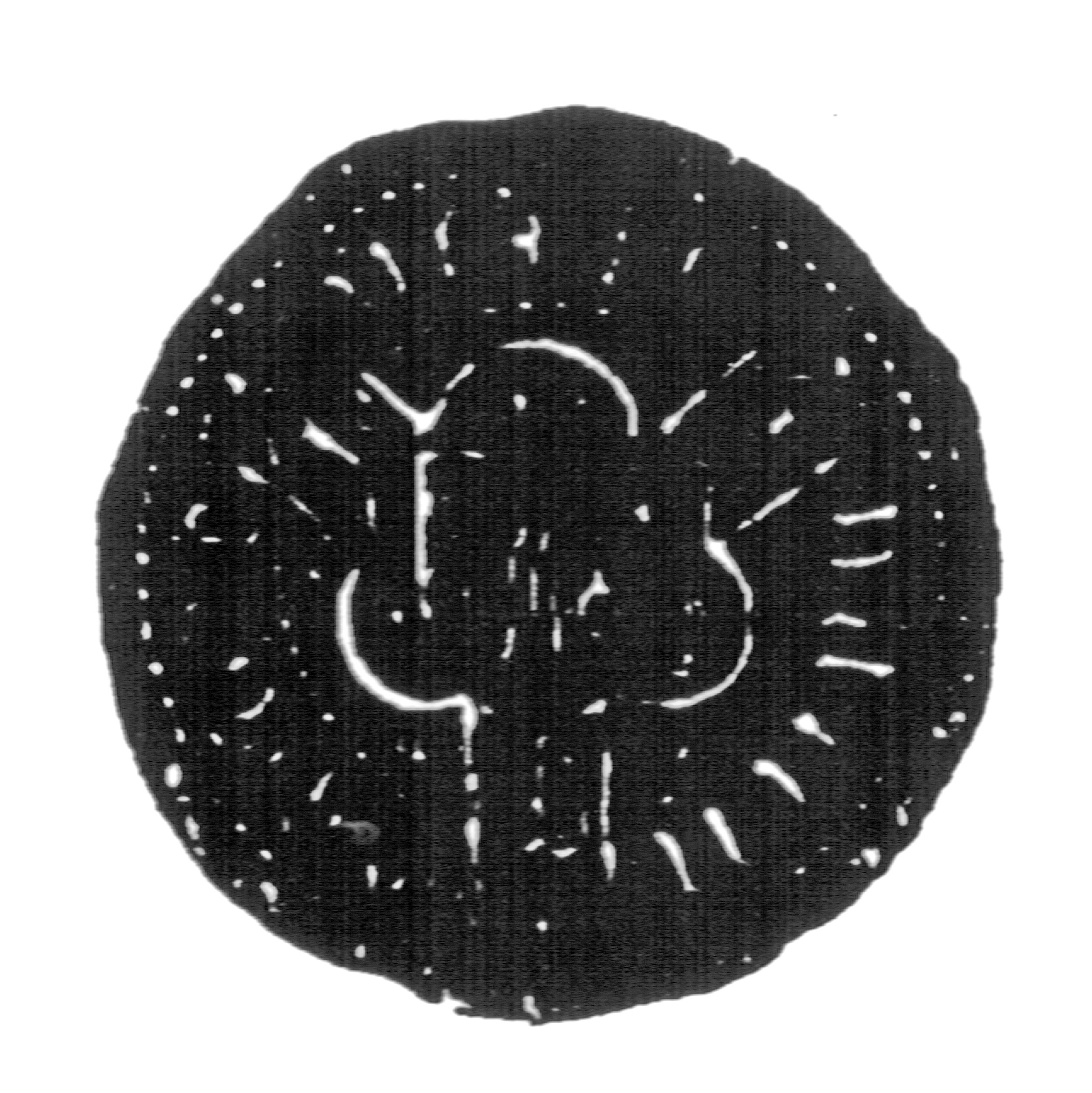 Siegel des Ratsmannes Johann(es) Growe. Das Siegel stammt aus der Zeit um 1412. Siehe Emil Ferdinand Fehling: Lübeckische Ratslinie, Nr. 455 (Johann Growe).